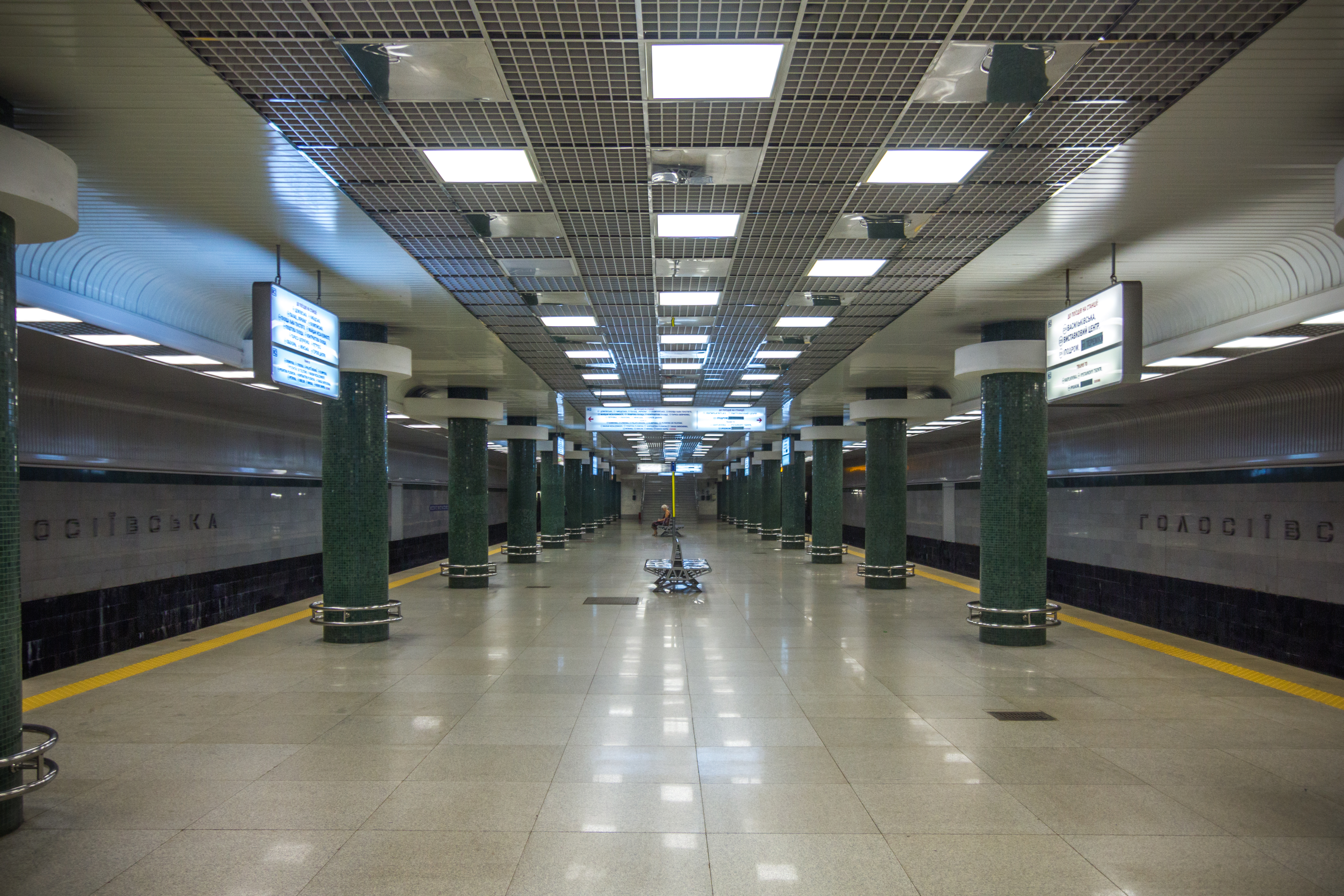 Голосеевская (станция метро)